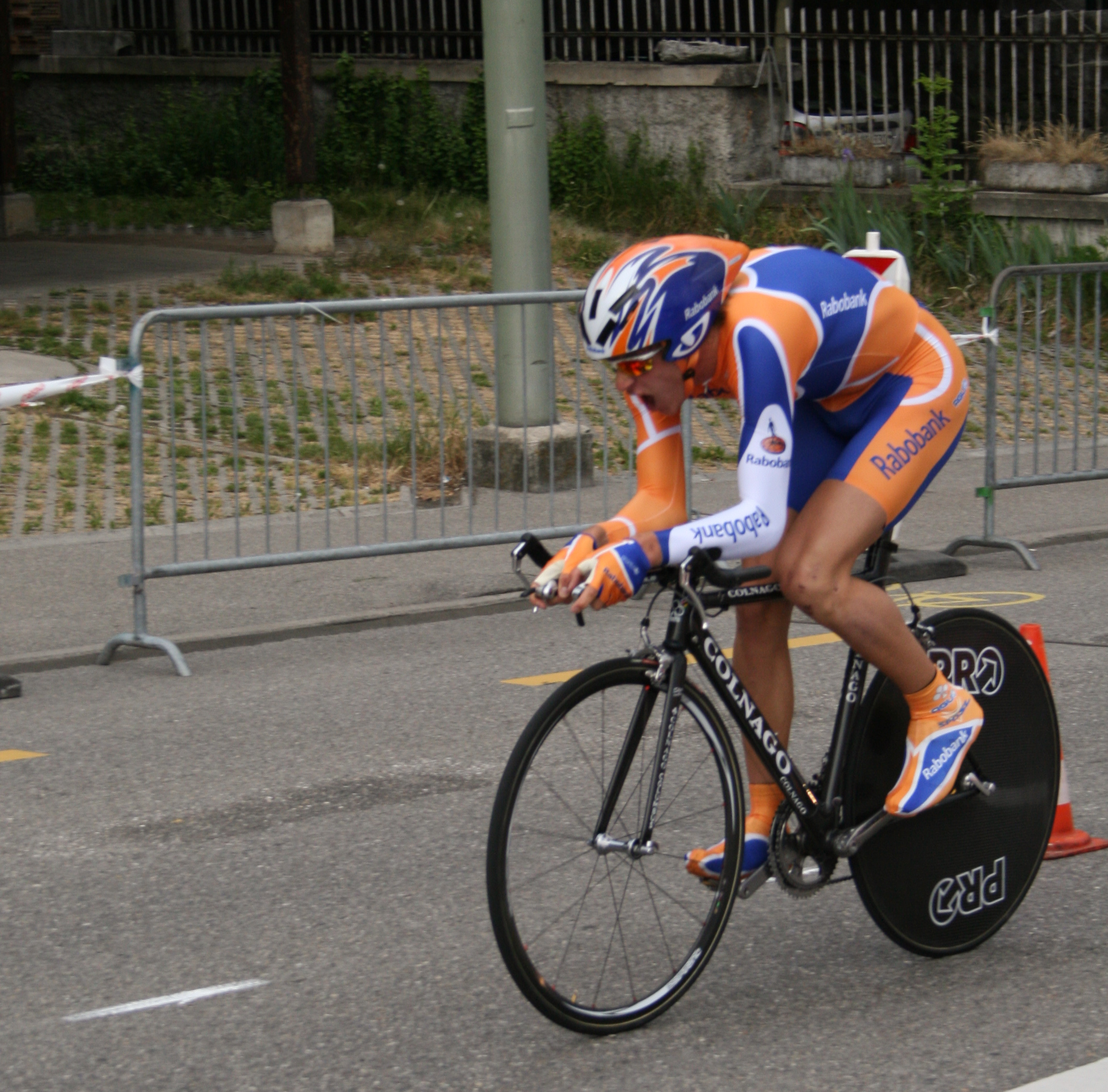 Kai Reus prologue du Tour de Romandie 2007